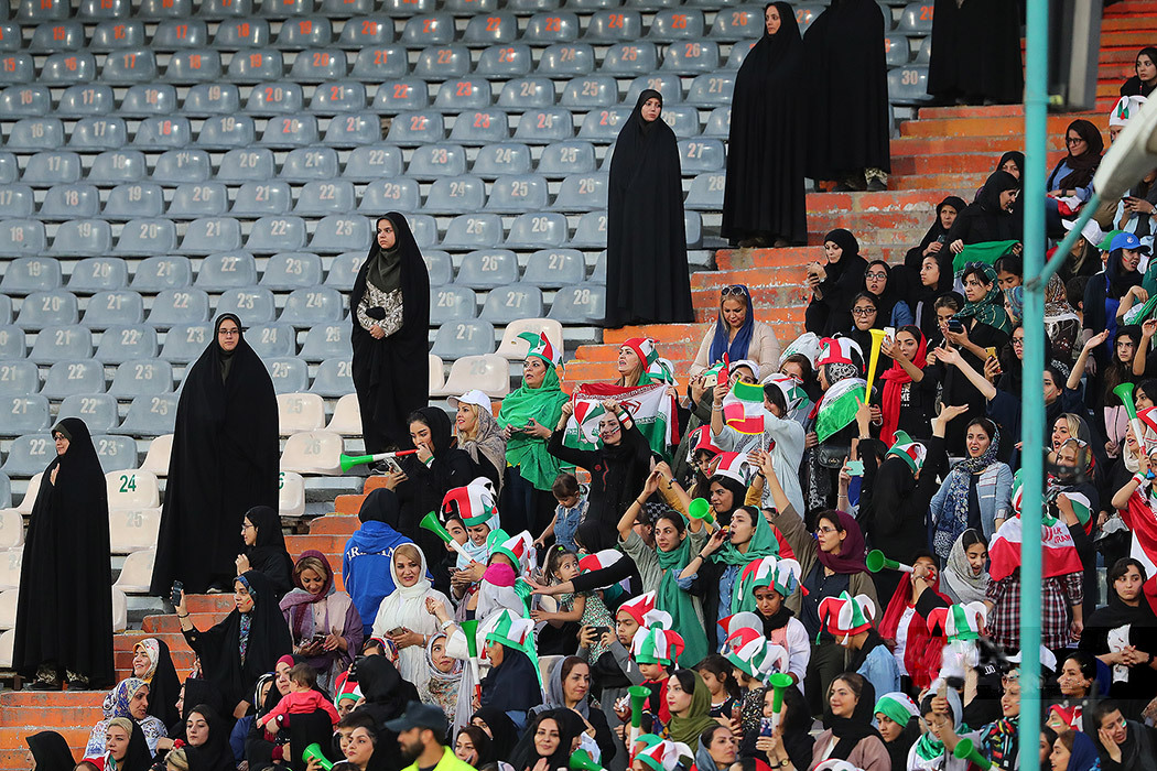 مسابقهٔ تیم‌های ملی فوتبال ایران و کامبوج در مرحله مقدماتی جام جهانی ۲۰۲۰، ورزشگاه آزادی تهران